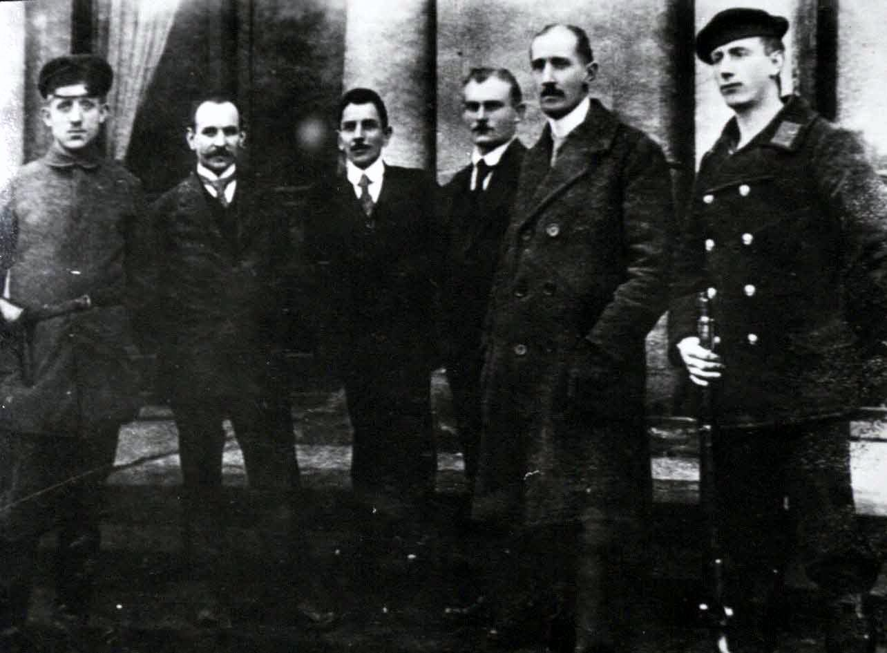 Braunschweig, Erster Weltkrieg & Novemberrevolution in Braunschweig, 8. November 1918: Die Delegation des Arbeiter- und Soldatenrates (v.l.n.r.: Friedrich Schubert, Henry Finke, August Merges, Paul Gmeiner, Hermann Schweiß und Hermann Meyer. Nach dem Foto in Reinhard Bein (Hrsg.): Braunschweig. Stadt und Herzogtum 1890–1918. Döring, Braunschweig 1985, ISBN 3-925268-01-4, S. 271.